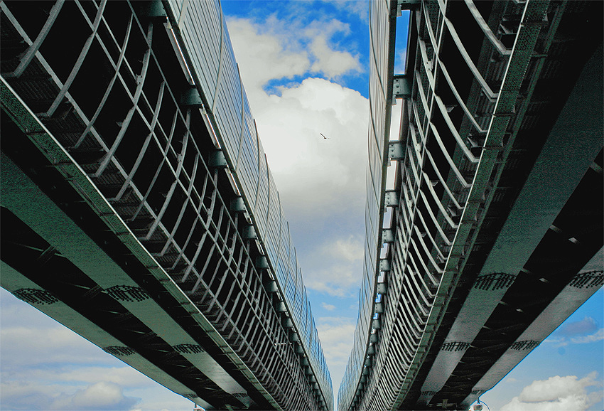 Наземное метро в Бутово